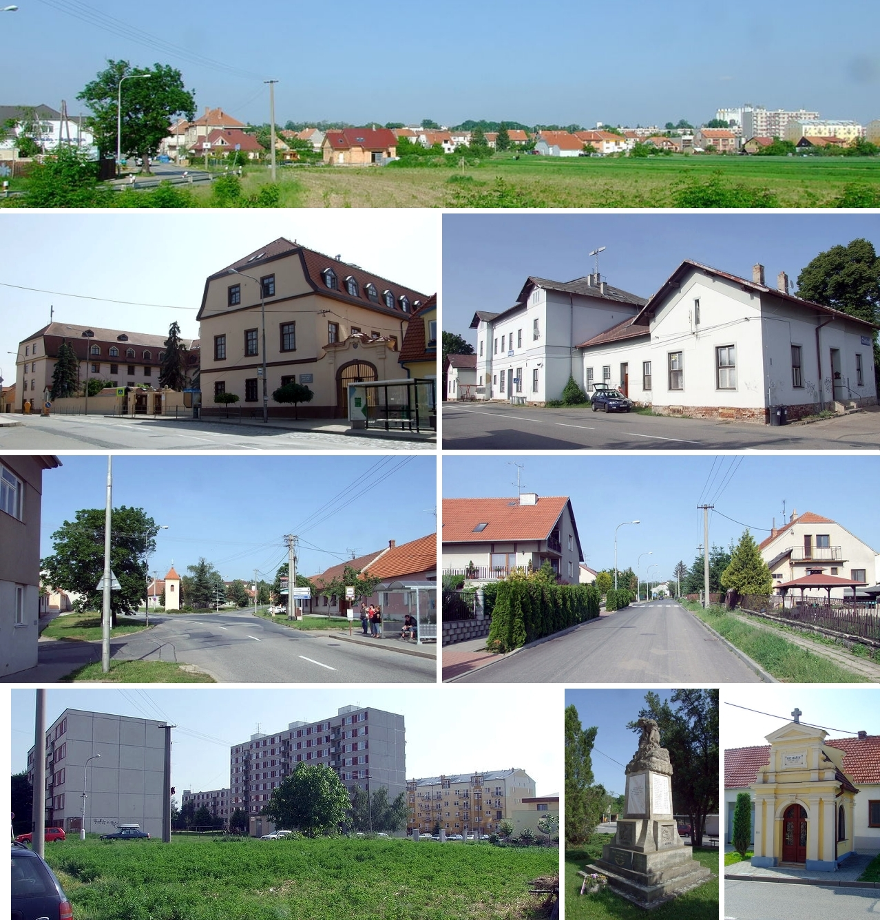 Brno-Chrlice, vyfotografované od západu Brno-Chrlice - kaplička v Zámecké ulici Brno-Chrlice - pomník obětem 2. světové války na Chrlickém náměstí Brno-Chrlice - Břetislavova ulice Brno-Chrlice - Chrlický zámek Brno-Chrlice - křižovatka ulic Zámecké a Ernsta Macha Brno-Chrlice - panelové sídliště Brno-Chrlice - vlakové nádraží